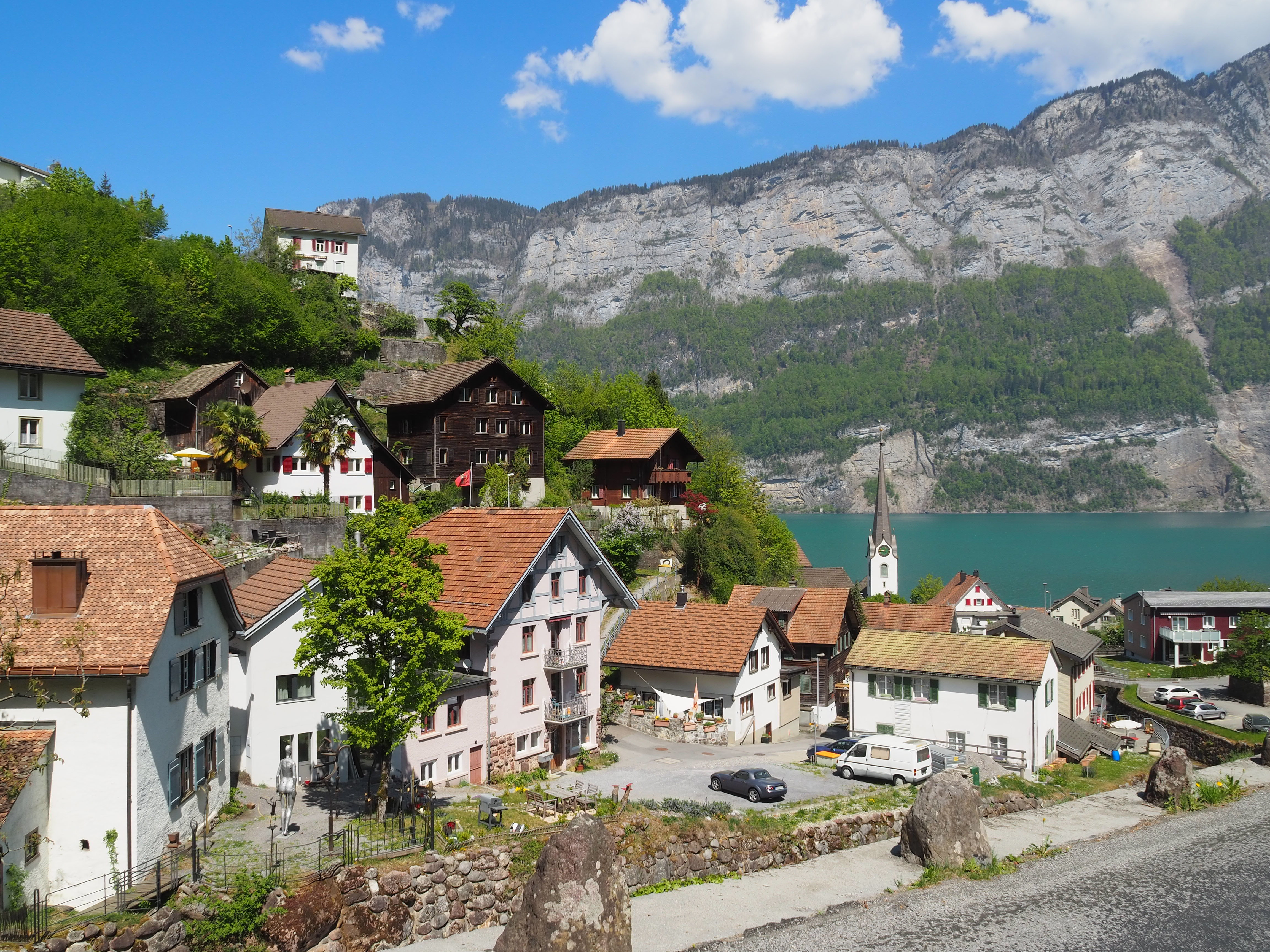 Mühlehorn am Walensee im Glarnerland, Schweiz